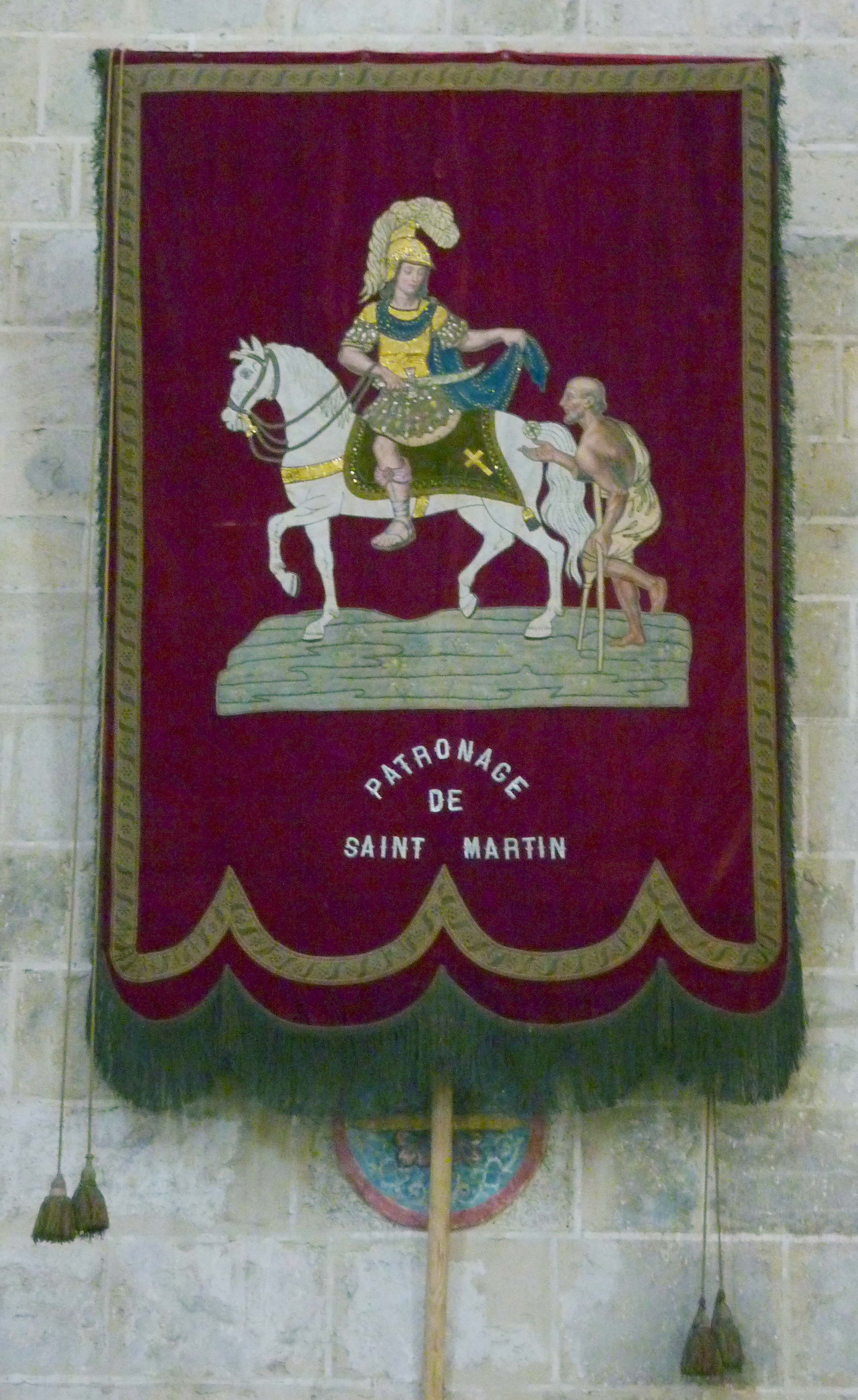 Kirchenfahne in der katholischen Kirche Saint-Martin in Étampes, Darstellung: hl. Martin